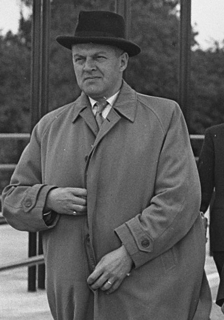 Collectie / Archief : Fotocollectie Anefo Reportage / Serie : [ onbekend ] Beschrijving : Opening brug over Twente Rijnkanaal te Lochem door ir. G.B.R. de Graaff, waarnemend secretaris-generaal van het ministerie van Verkeer en Waterstaat. Vlnr. W.P.F. Boshouwers, lid Gedeputeerde Staten van Gelderland, ir. De Graaff en de burgemeester van Lochem, H.A. Beusekamp Datum : 2 juli 1955 Locatie : Lochem Trefwoorden : ambtenaren, bruggen, burgemeesters, gedeputeerden, genodigden, openingen Persoonsnaam : Beusekamp H A, Boshouwers W P F, Graaf G B R de Fotograaf : Bilsen, Joop van / Anefo Auteursrechthebbende : Nationaal Archief Materiaalsoort : Glasnegatief Nummer archiefinventaris : bekijk toegang 2.24.01.09 Bestanddeelnummer : 907-2130